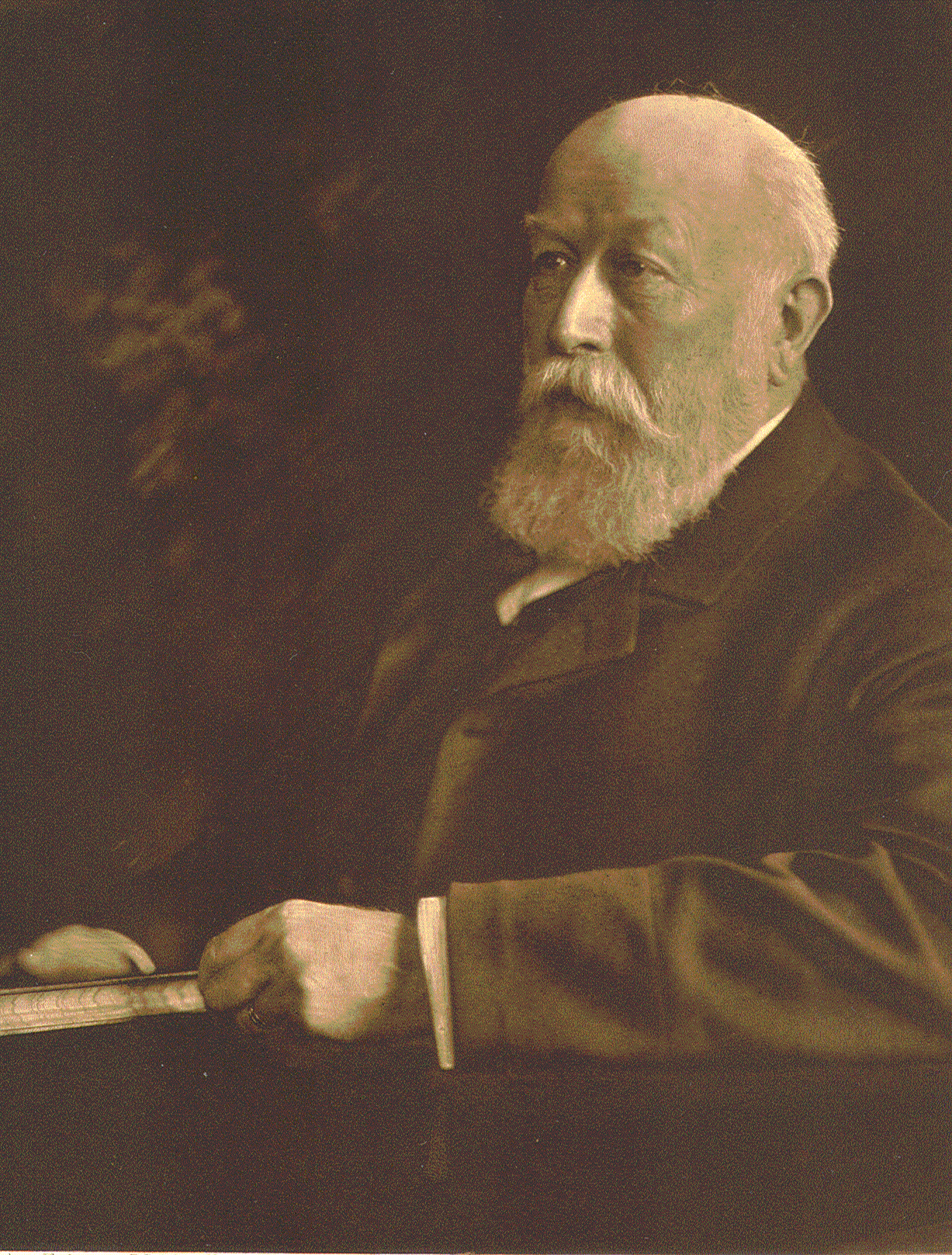 Rudolph Crasemann, 1841–1929 Kaufmann und Politiker